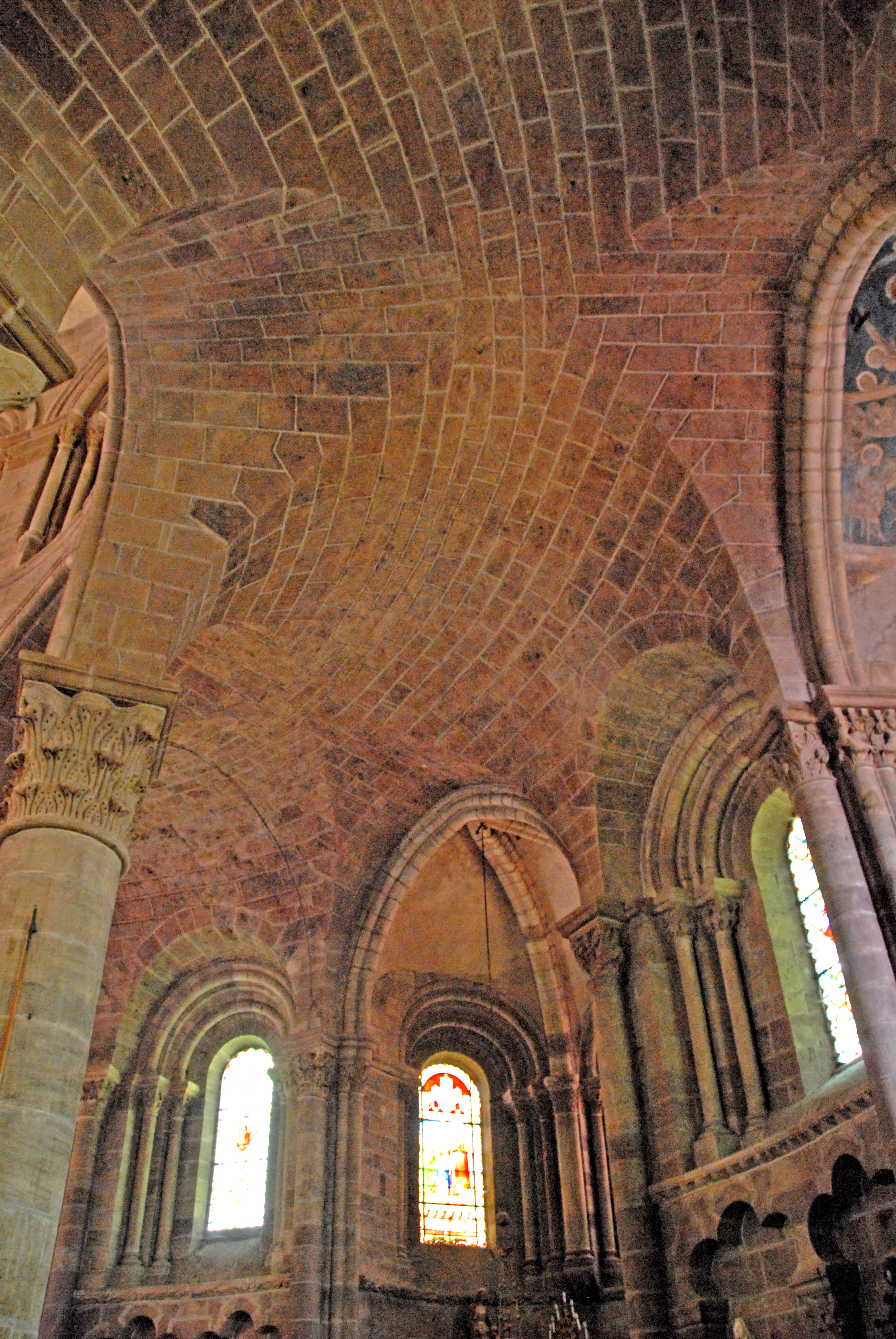 Sain-Julien Brioude, Umgangsgewölbe, Scheitelkapelle